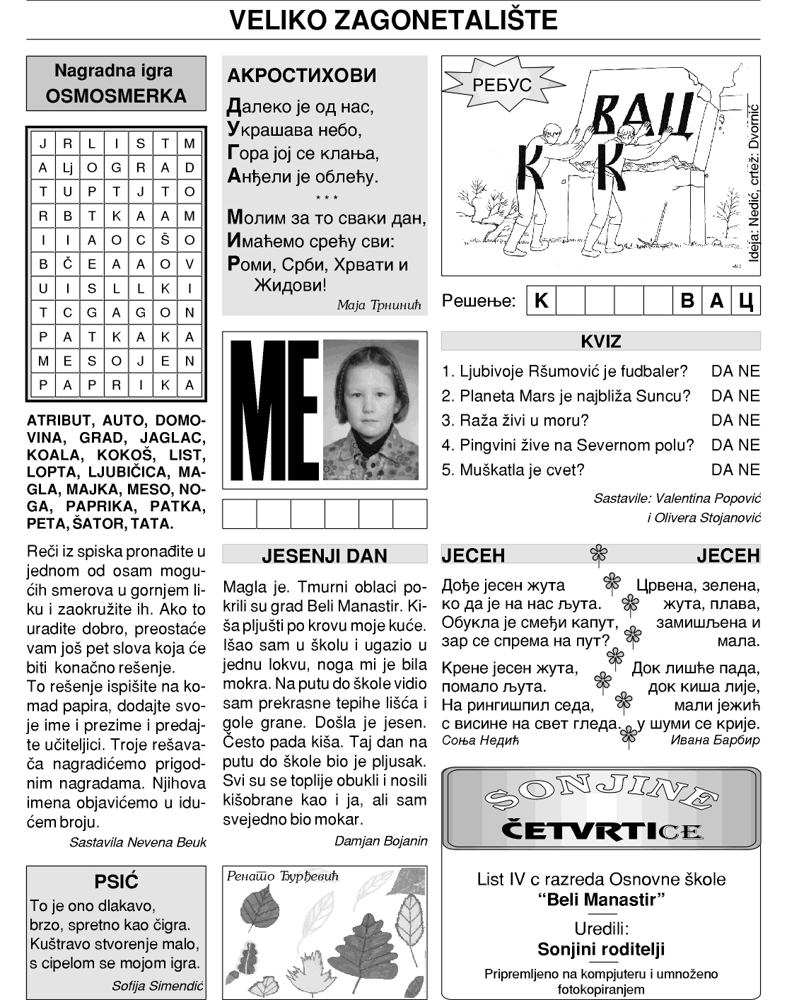 Sonjine trećice, Beli Manastir